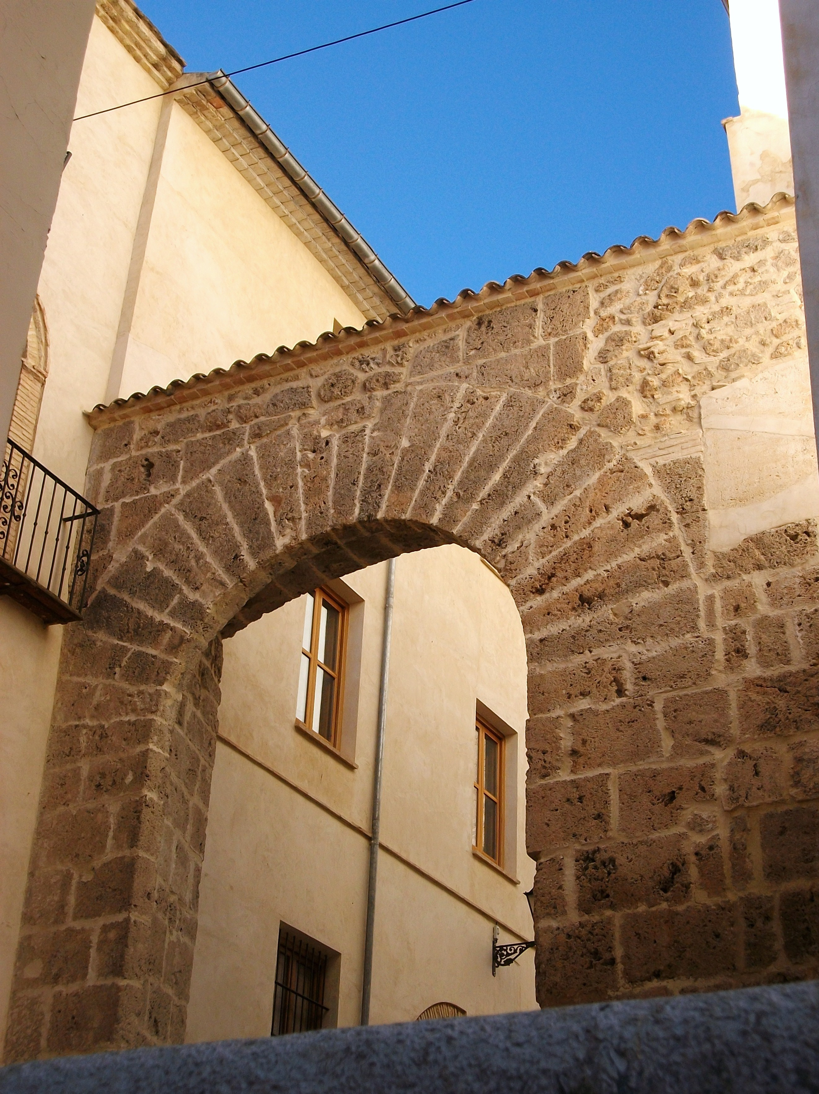 Porta de la Vila, Albaida.